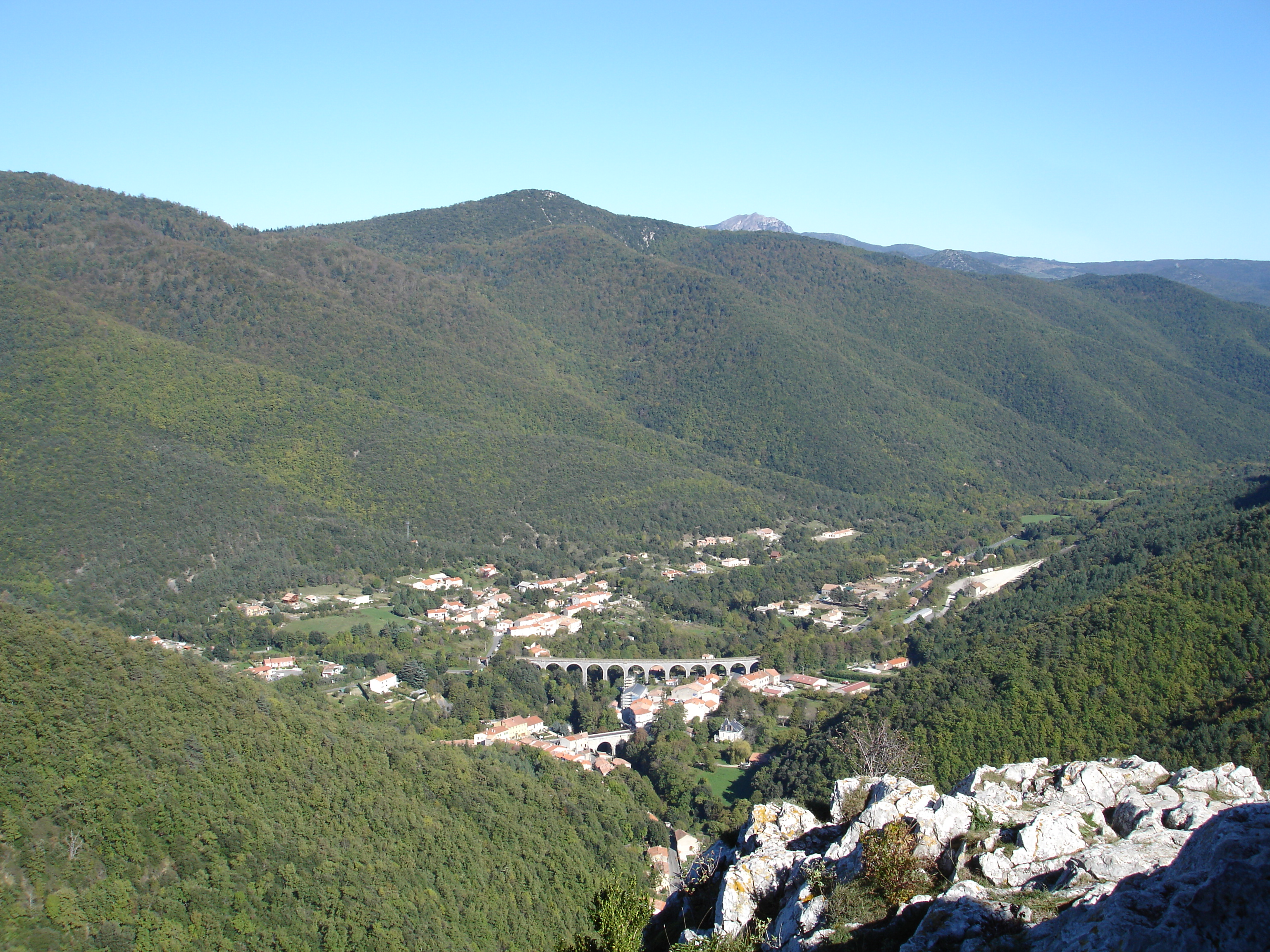 Château de Puilaurens